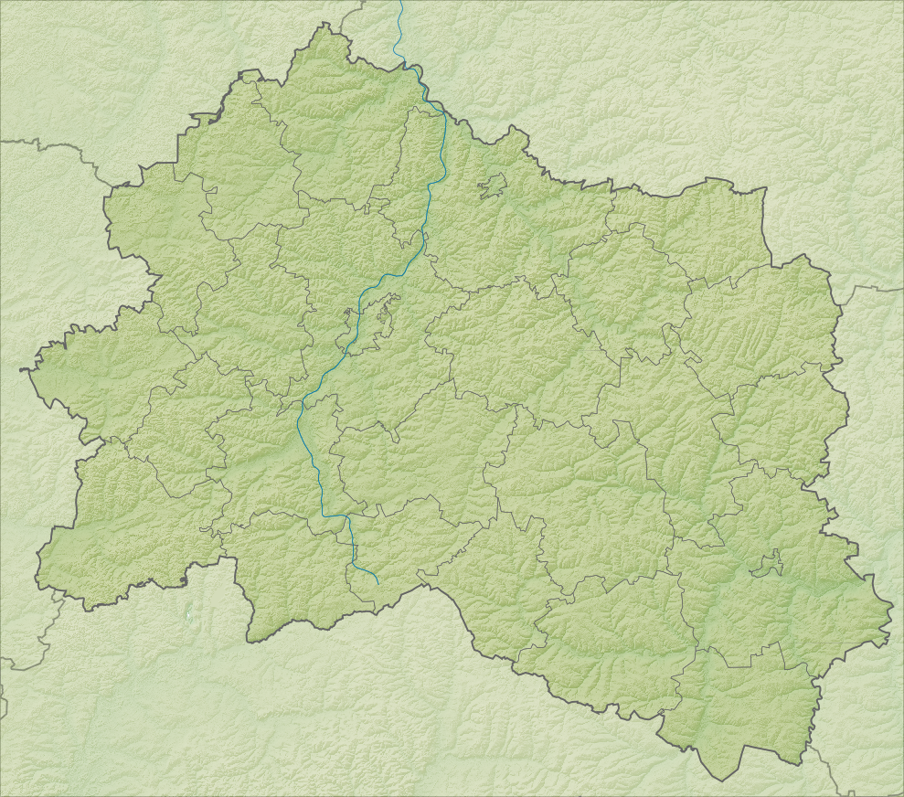 Физическая карта Орловской области. Область: E34.7175 / E38.1059 / N51.8997 / N53.7024 Инструменты: GMT, Inkscape This map may be incomplete, and may contain errors. Don't rely solely on it for navigation.